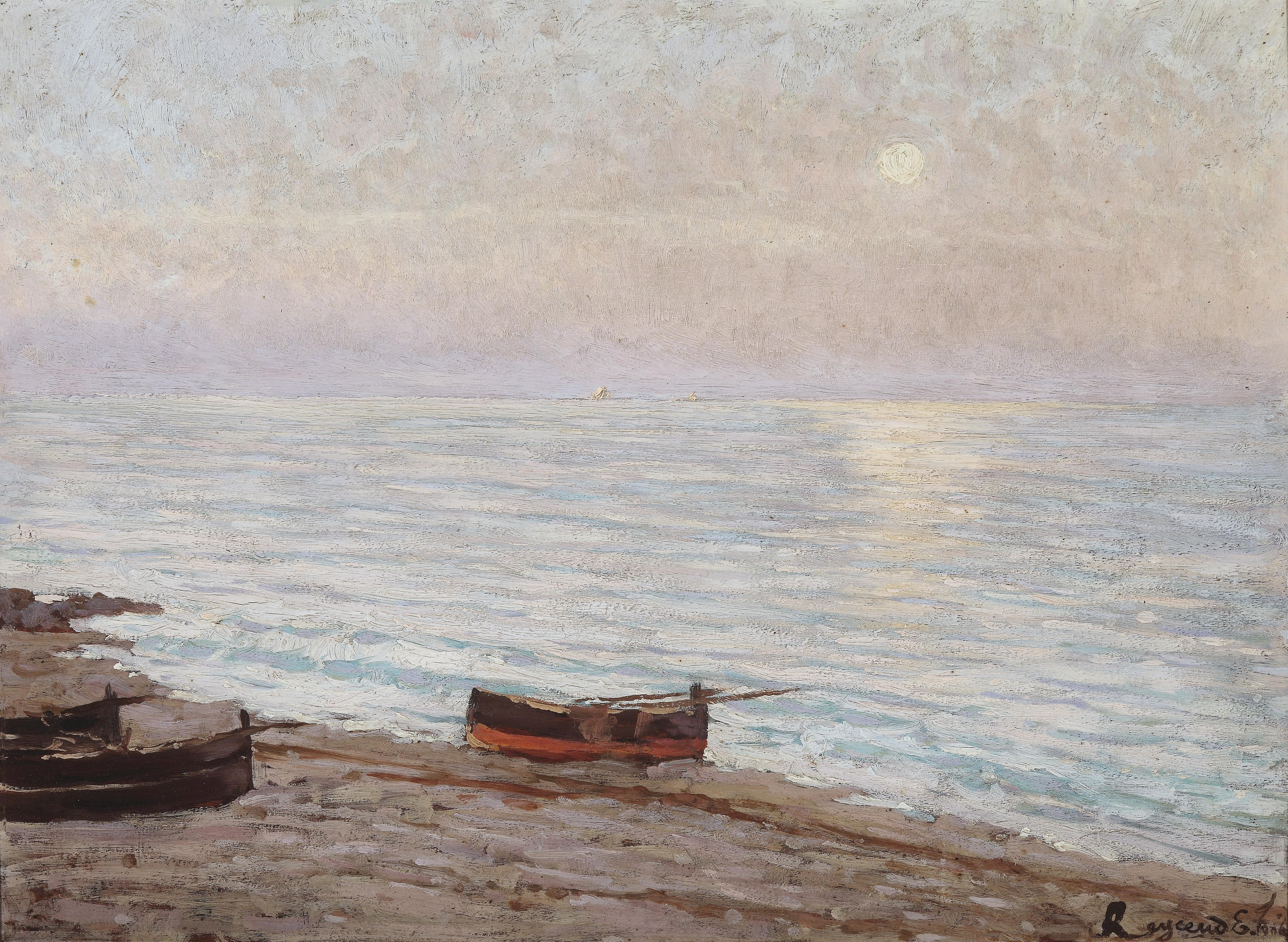 Abendstimmung, rückseitig signiert, datiert und betitelt Enrico Reycend di Torino 1905 „ultima luce sul mare“, Öl auf Holz, 37 x 50 cm